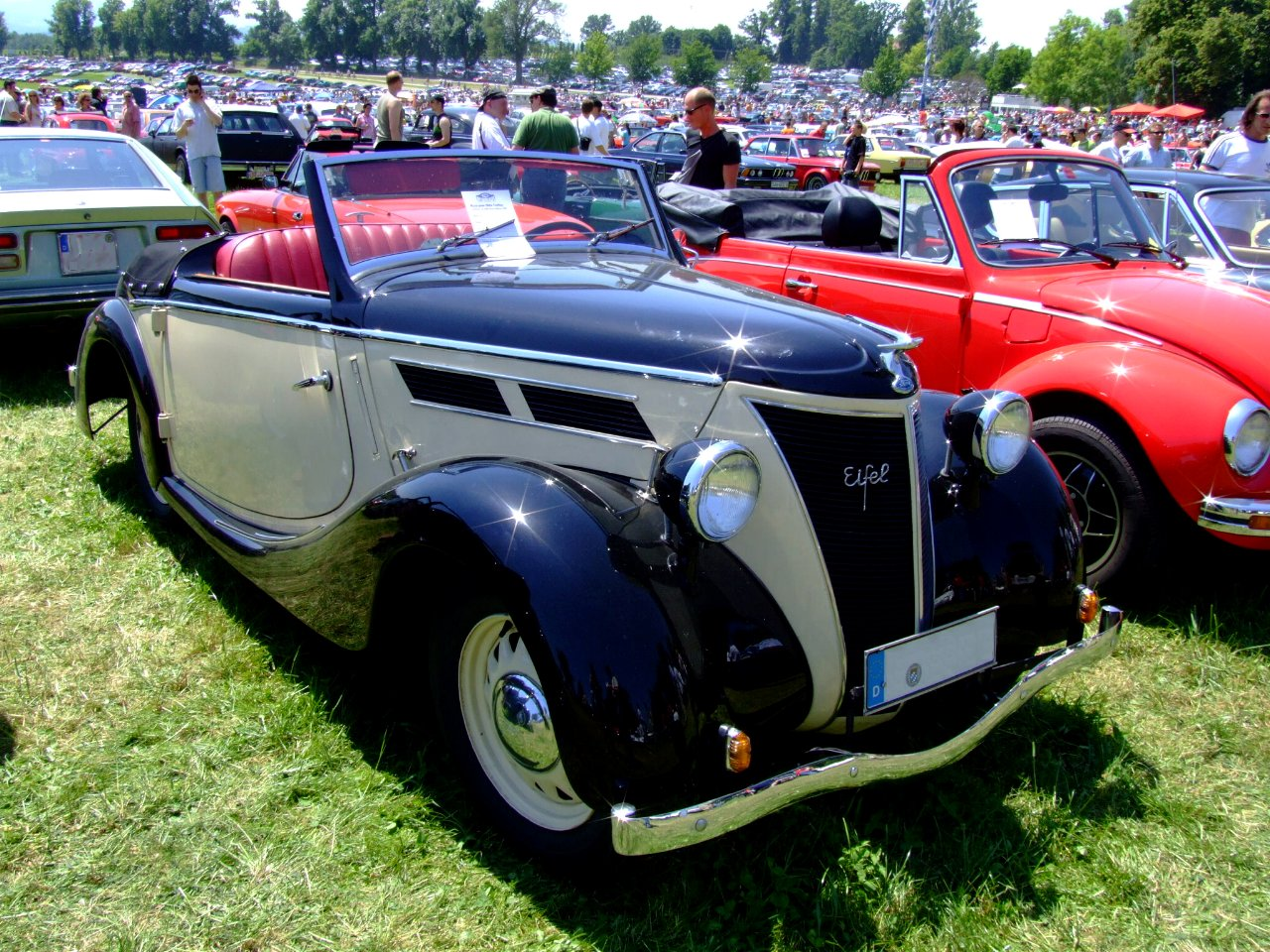 Ford Eifel Baujahr: 1938 34 PS